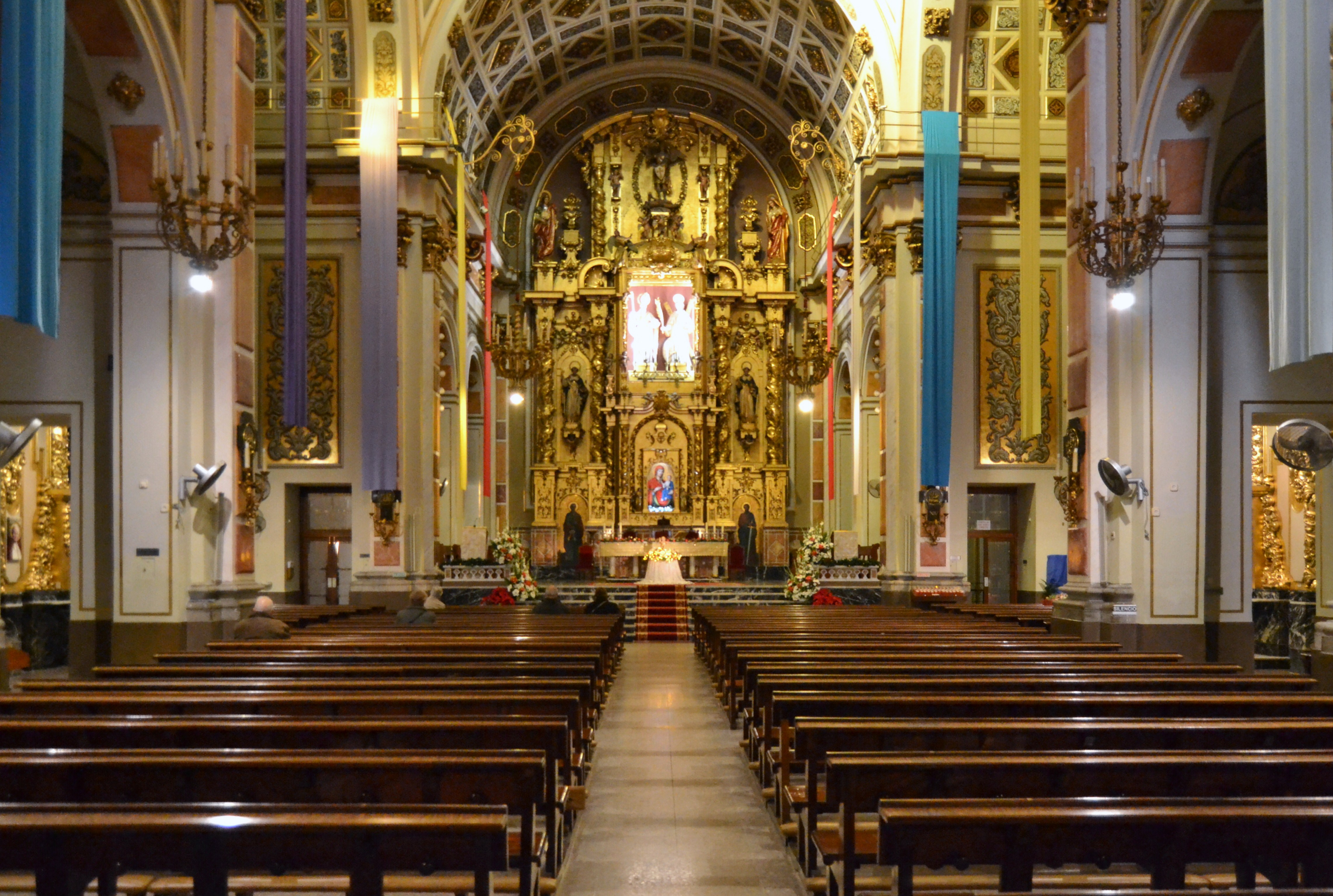 Església de sant Valeri de Russafa, interior.